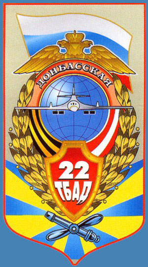 Эмблема 22 тяжелой бомбардировочной авиационной дивизии (на синем фоне)